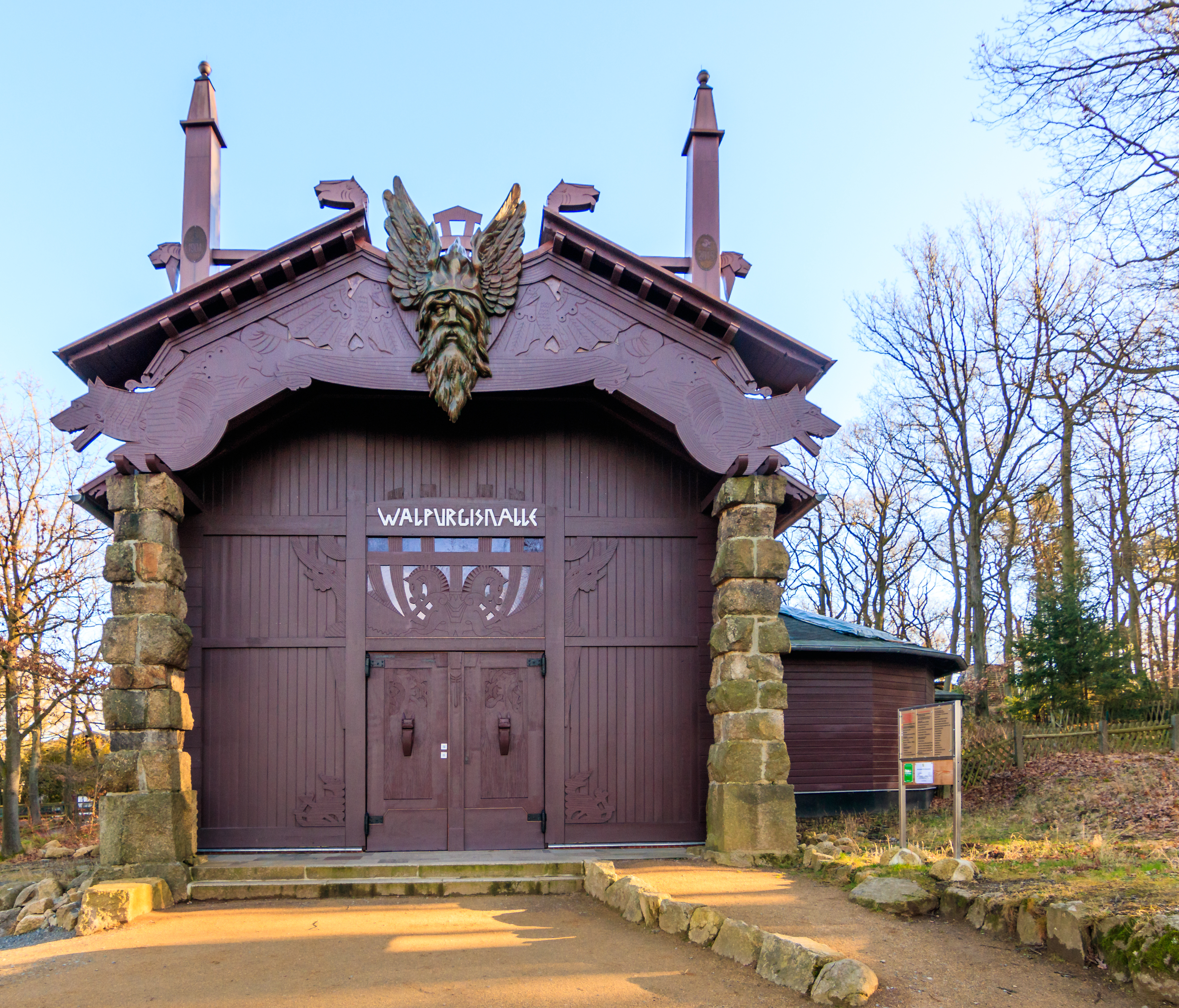 Walpurgishalle